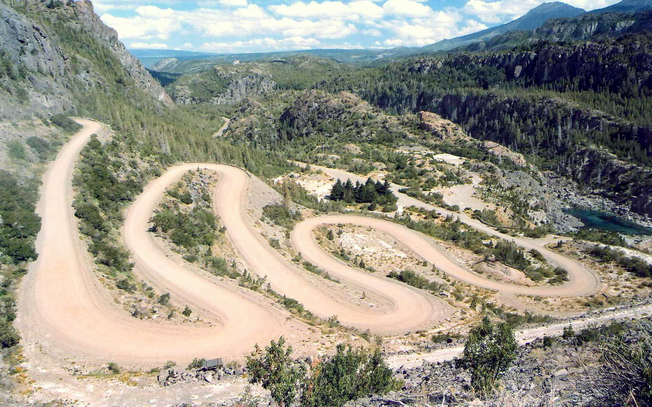 Serpentina de acceso a la Presa de Futaleufú, Chubut, Argentina